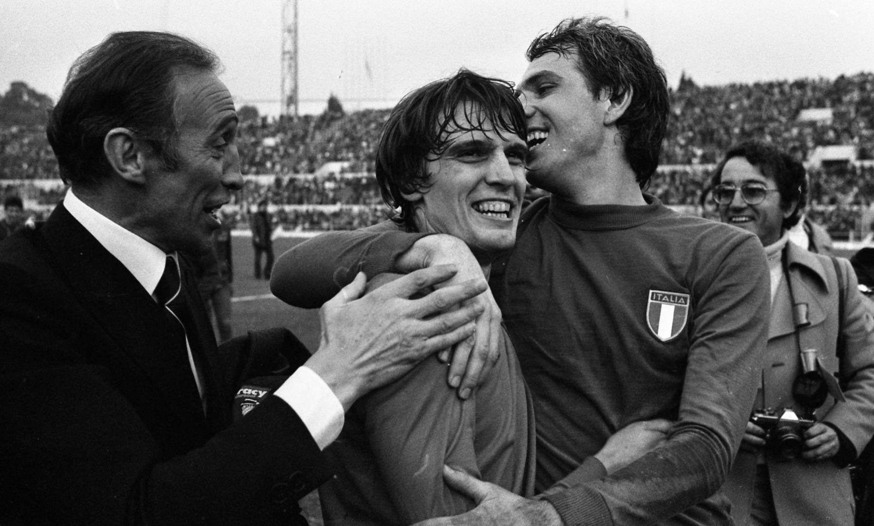 Roma, stadio Olimpico, 17 novembre 1976. Da sinistra: il commissario tecnico dell'Italia, Enzo Bearzot, e i giocatori azzurri Marco Tardelli e Roberto Bettega, festeggiano al fischio finale la vittoria sull'Inghilterra (2-0) nella sfida valevole per le qualificazioni al campionato del mondo 1978.